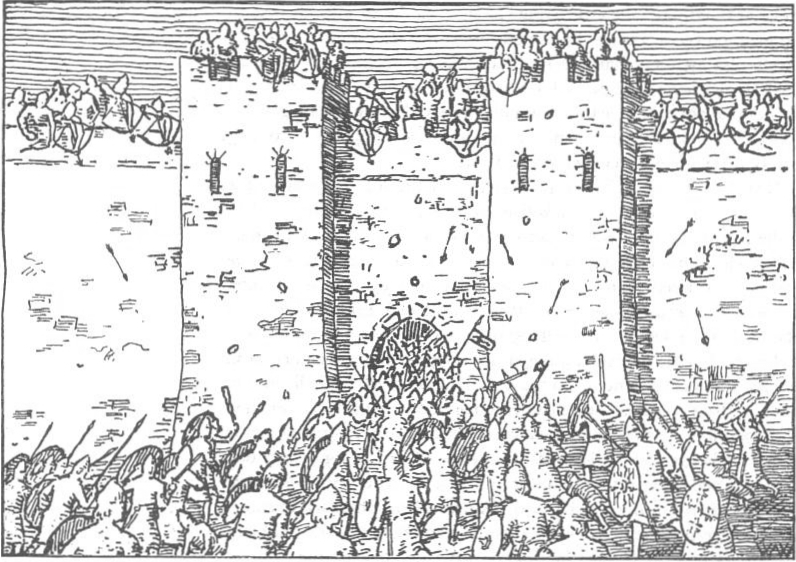 Wilhelm Wetlesen: Illustration for Harald Hardrådes saga, Heimskringla 1899-edition. nn: «Det vart eit slag i borgporten mellom væringane og bymennene.»